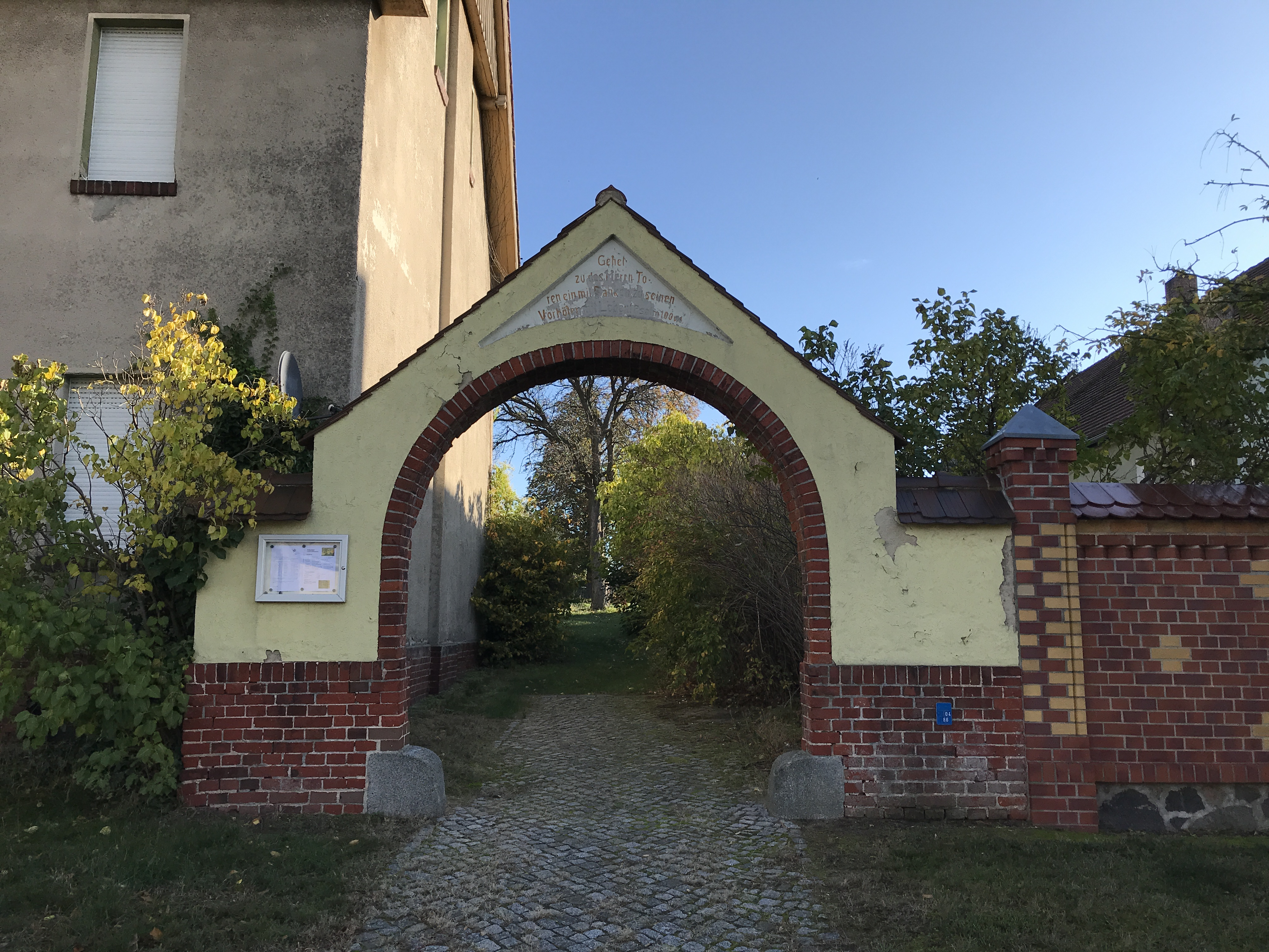 Die Dorfkirche Hohenseefeld in der Gemeinde Niederer Fläming im Landkreis Teltow-Fläming ist eine Feldsteinkirche aus dem 13. Jahrhundert. Im Innern steht unter anderem ein hölzerner Kanzelaltar, der Ende des 19. Jahrhunderts unter Verwendung historischer Teile entstand.